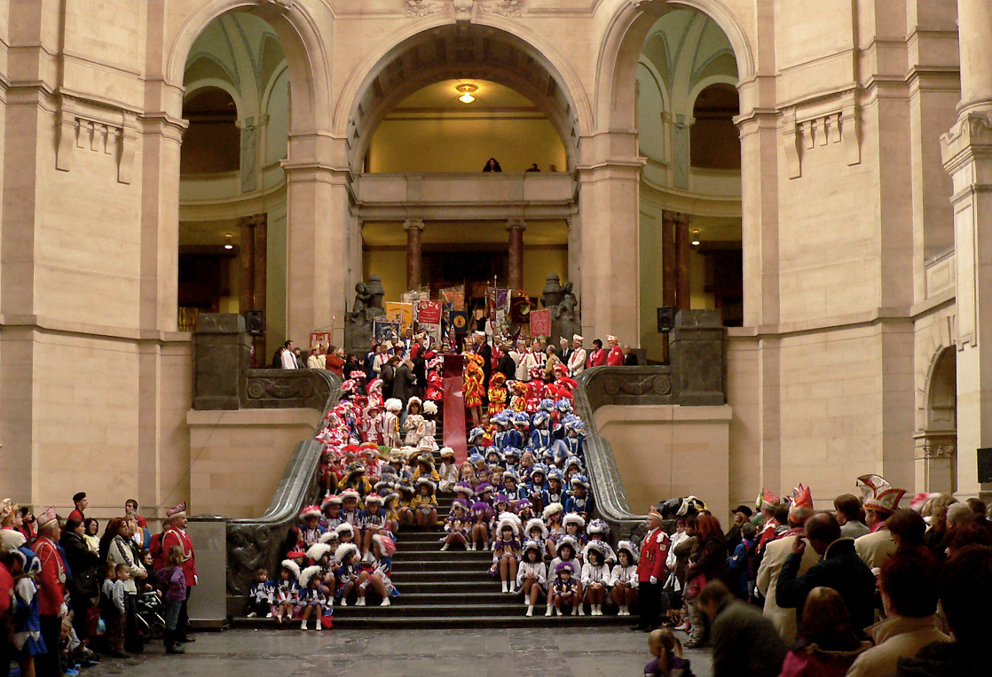 Karnevalserstürmung Rathaus Hannover